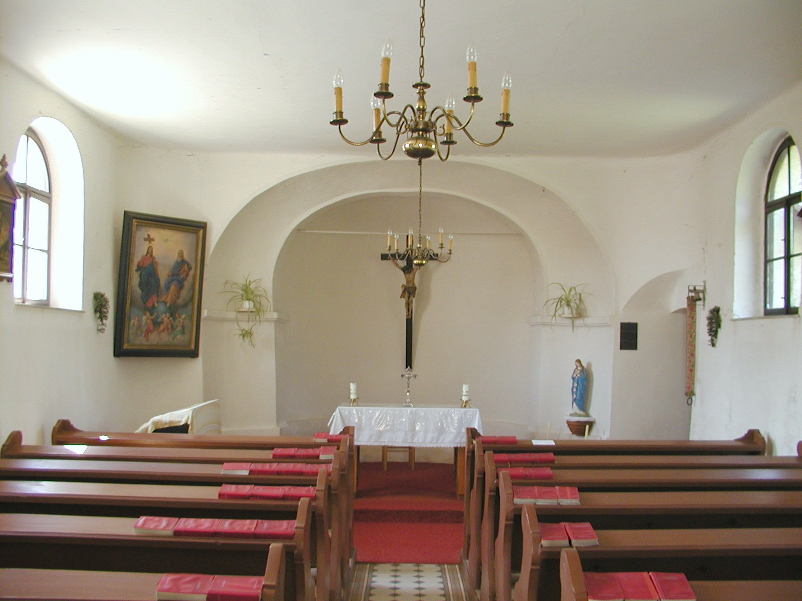 Einsicht in die Kapelle Richtung Süden